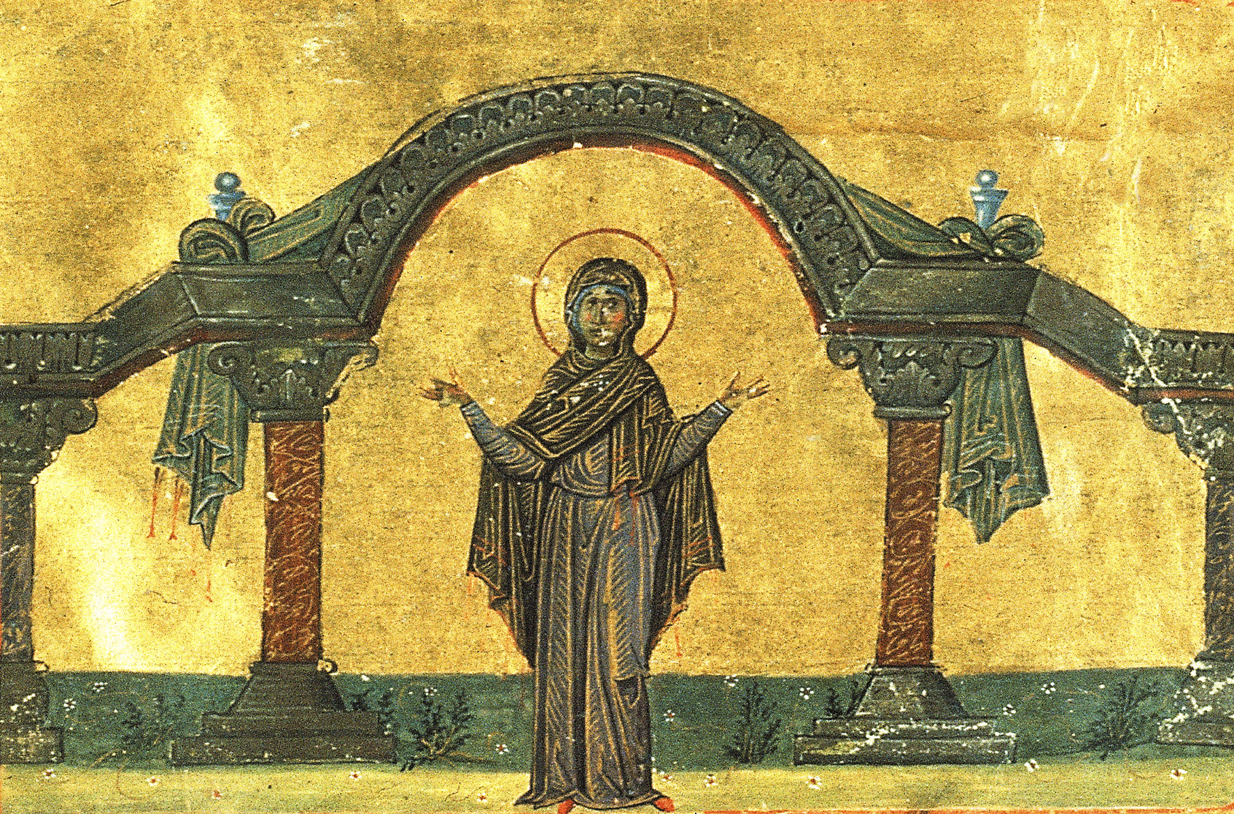 Домнина Сирийская